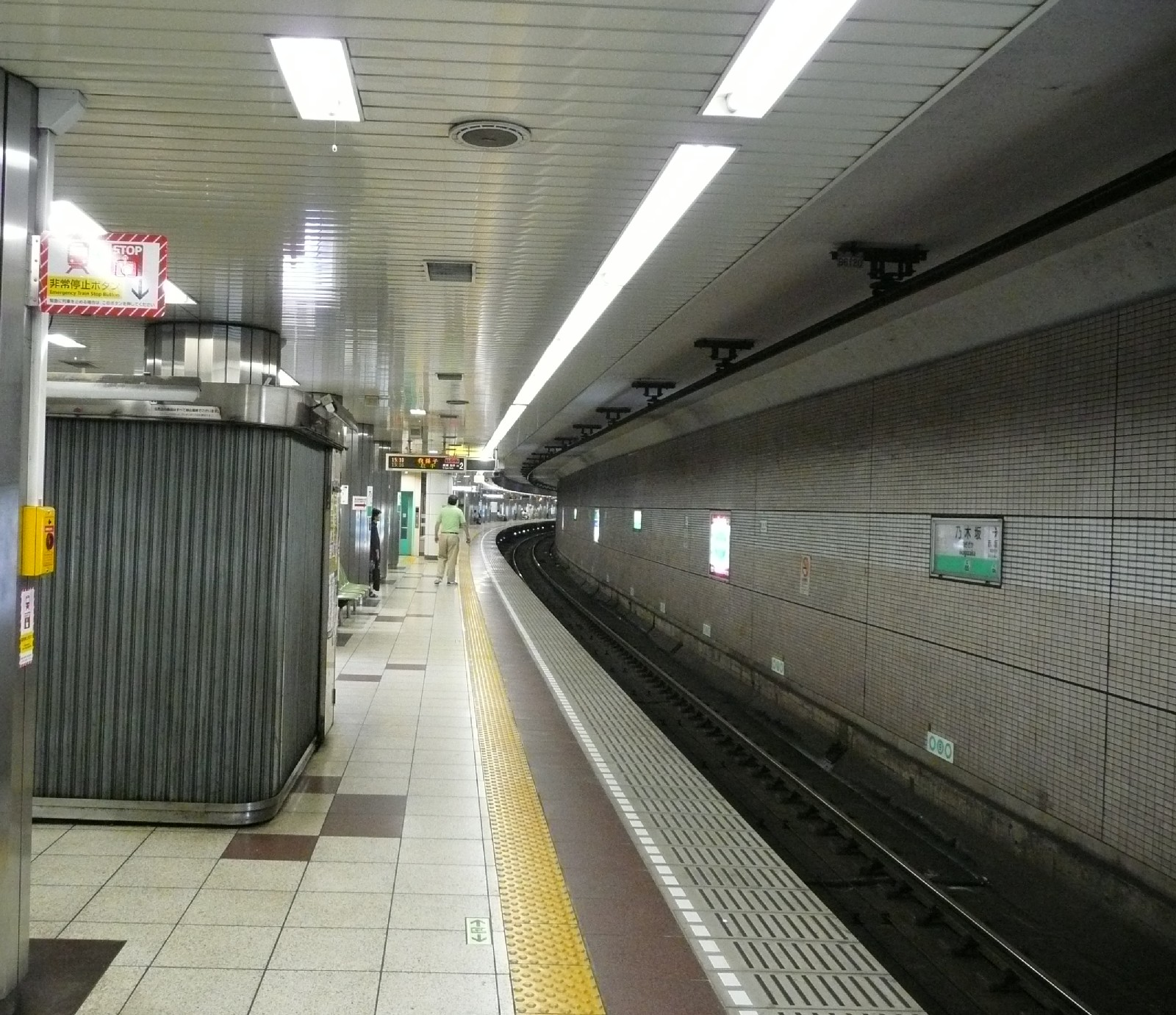 乃木坂駅ホーム